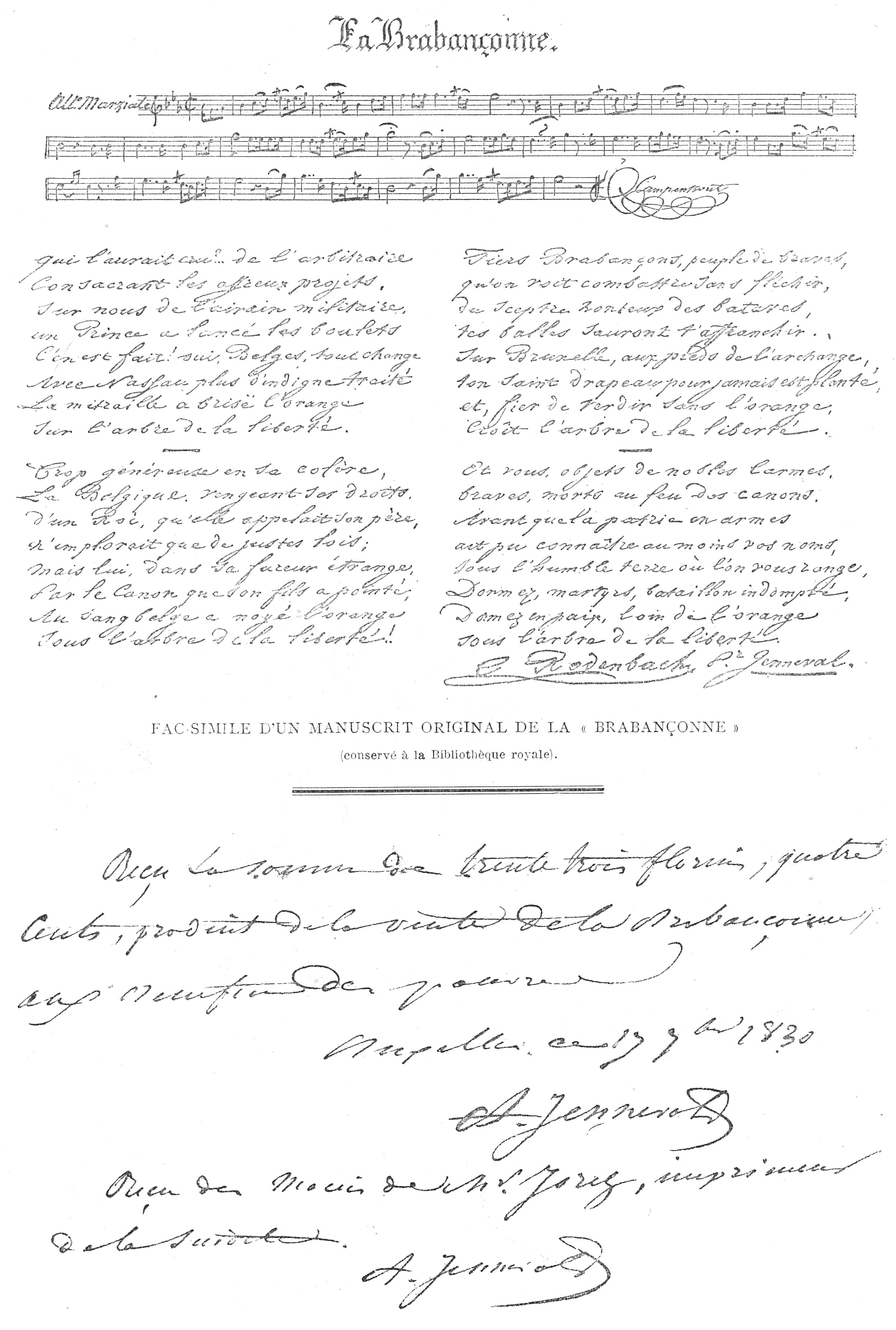 Fac-similé de l’écriture et de la signature de Jenneval.